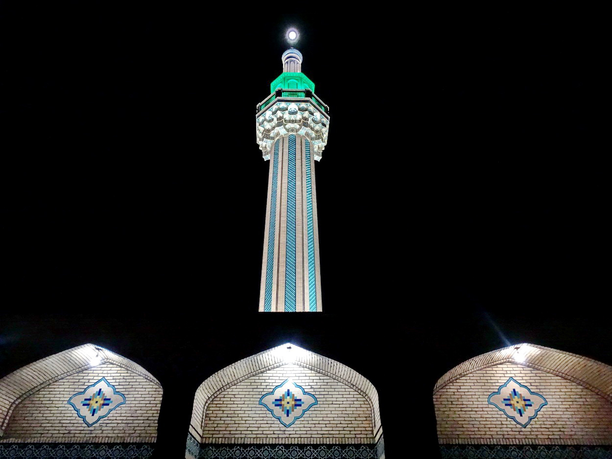 گلدسته امامزاده کاظم در طبس